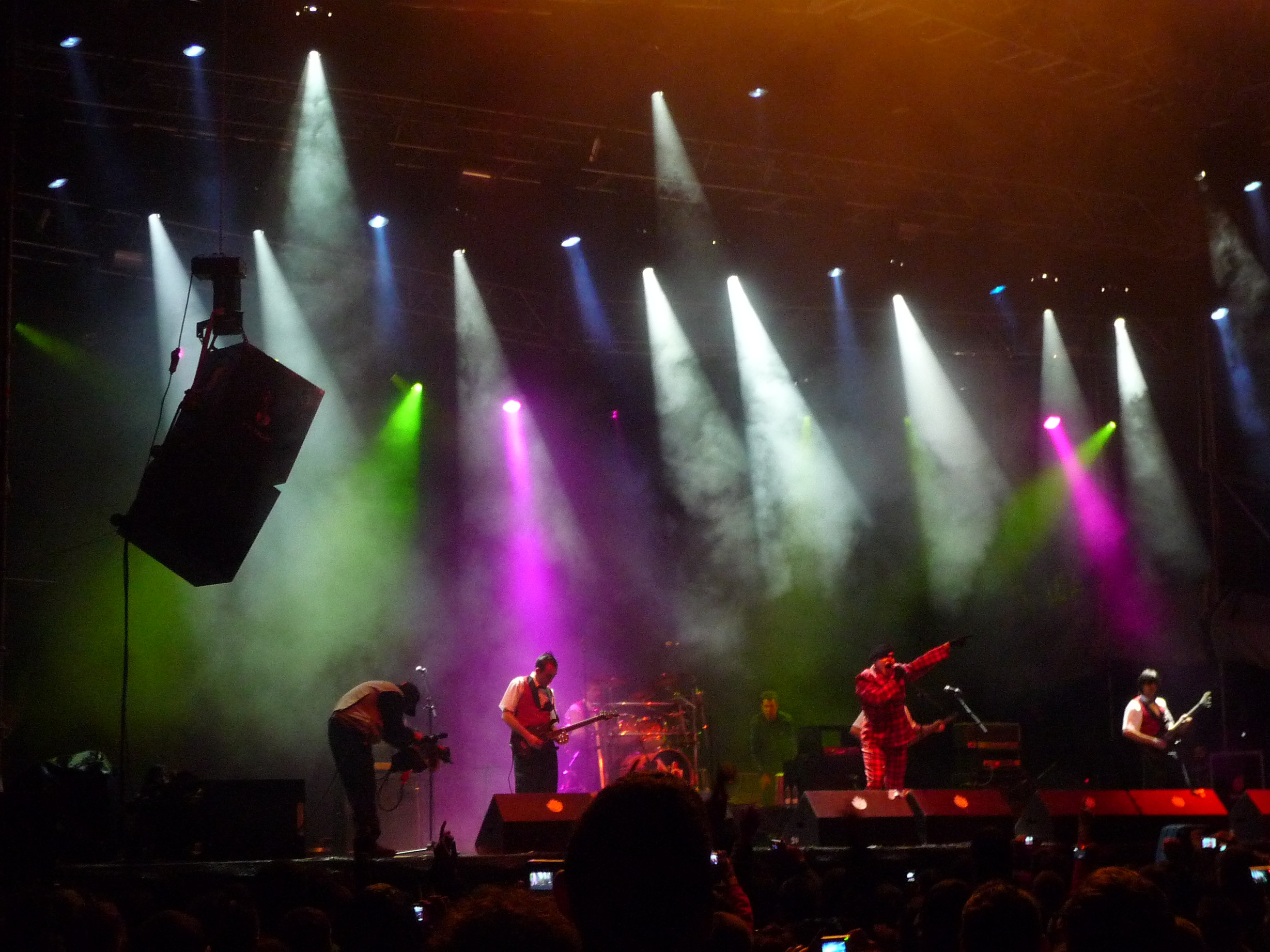 El Noi del Sucre en Extremúsika 2009